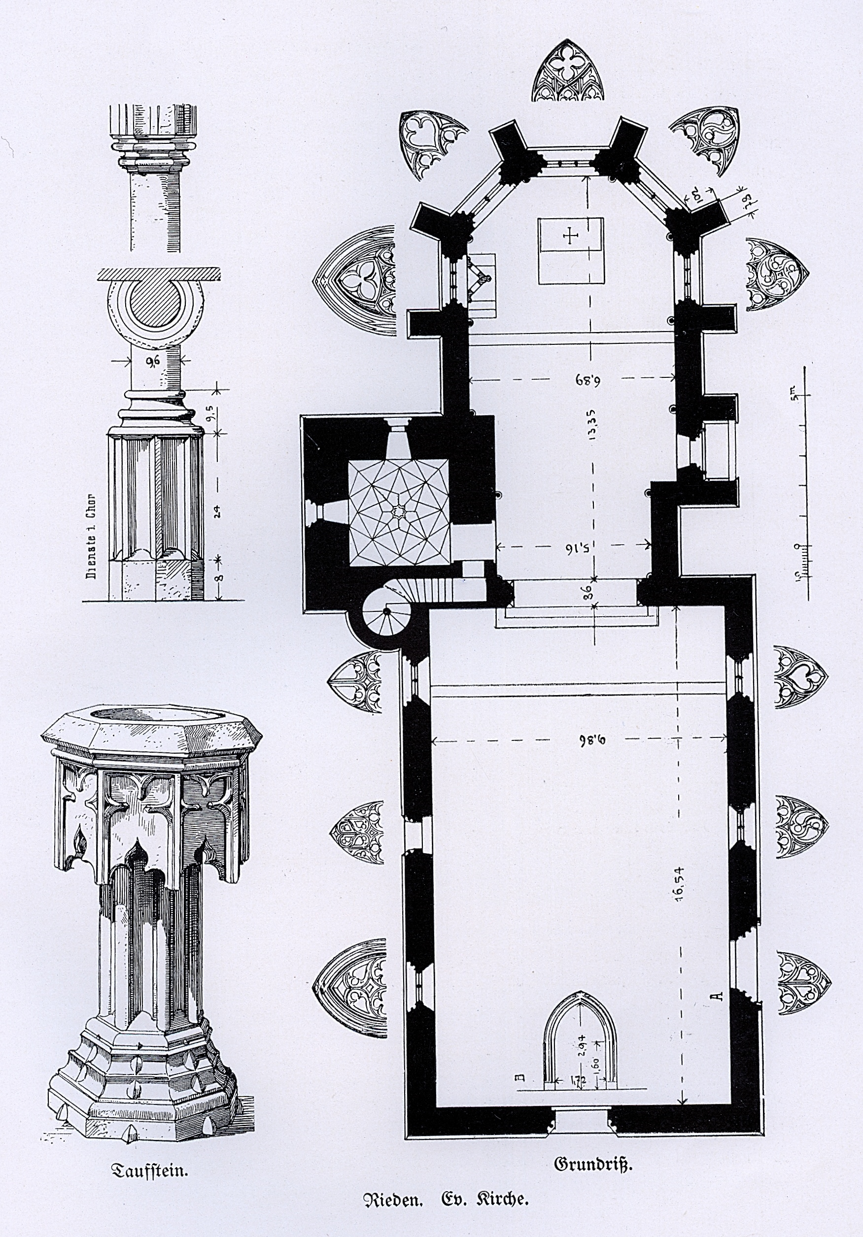 Grundriss, Taufstein und Dienste im Chor der evangelischen Marienkirche in Rieden (Rosengarten), Landkreis Schwäbisch Hall